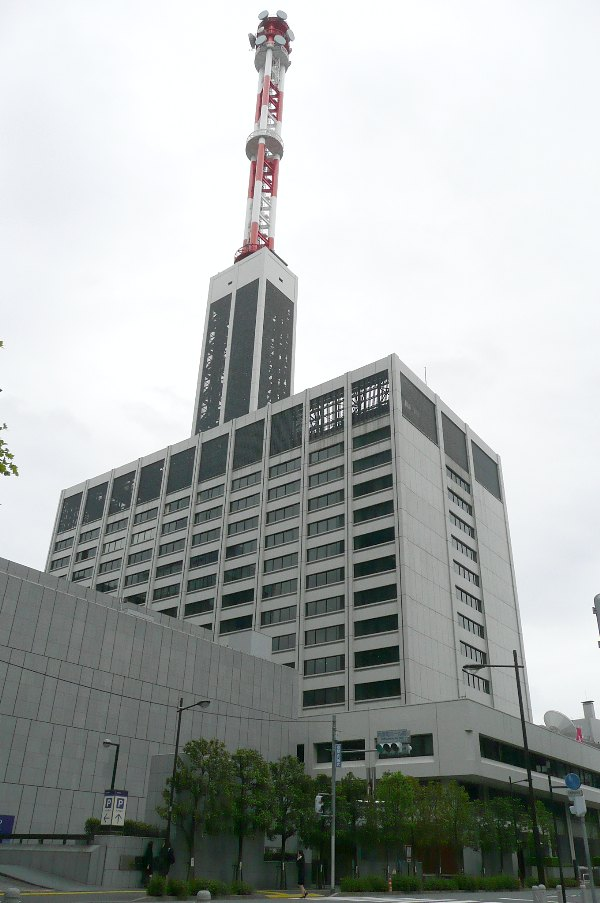 東京電力本社 投稿者↑PON（ウエポン）が2007年4月22日に撮影 一部編集の上で2007年4月30日にアップロード